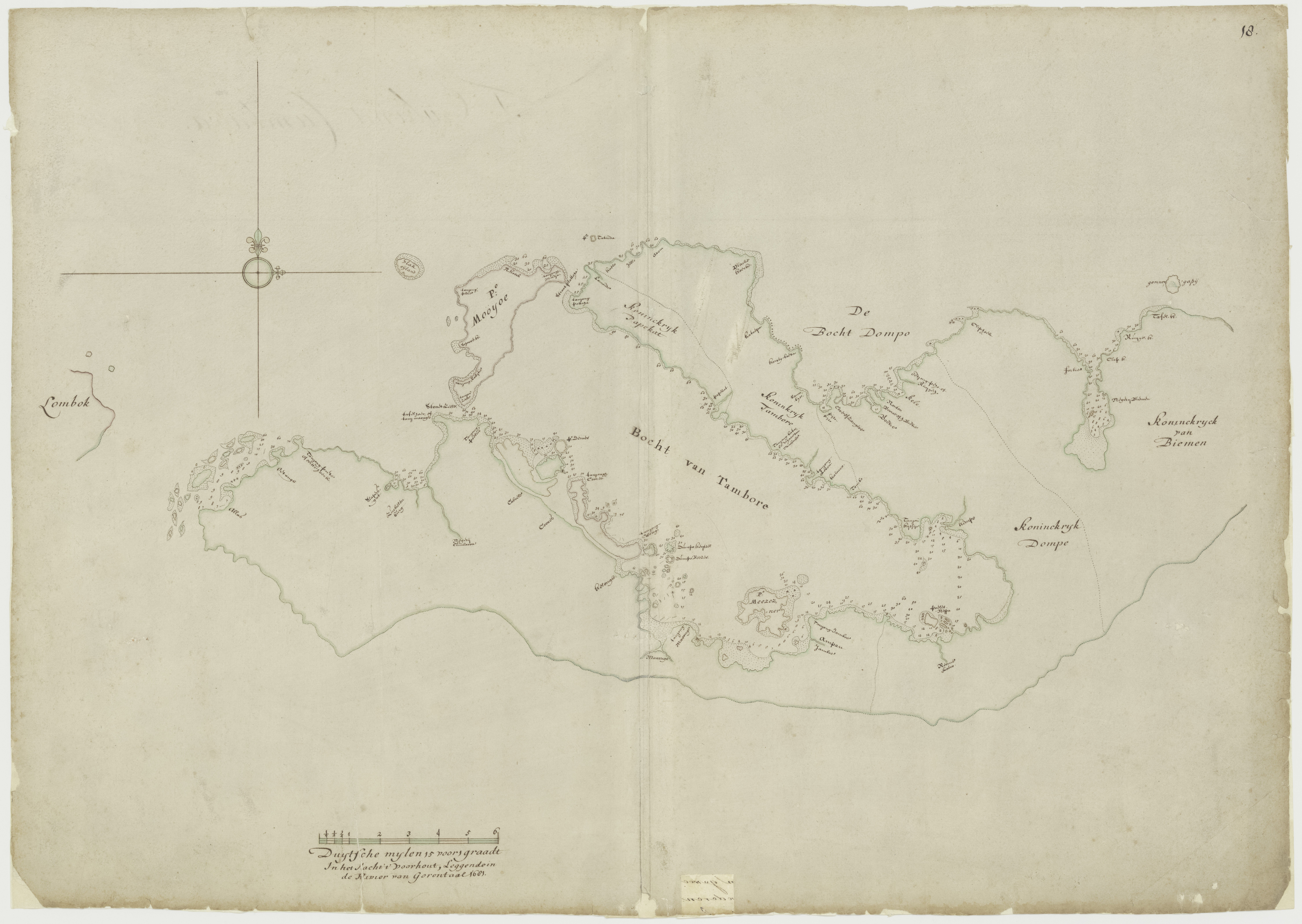 452, Kaart van een gedeelte der Noordkust van het Eiland Sumbawa bevattende de Bogt van Tambore, Dompo, Bima enz. 1681. Manuscript Groot 0.52 - 0.74 El.